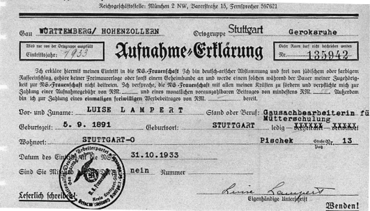 Luise Lampert NS-Frauenschaft 1933 Aufnahmeerklärung